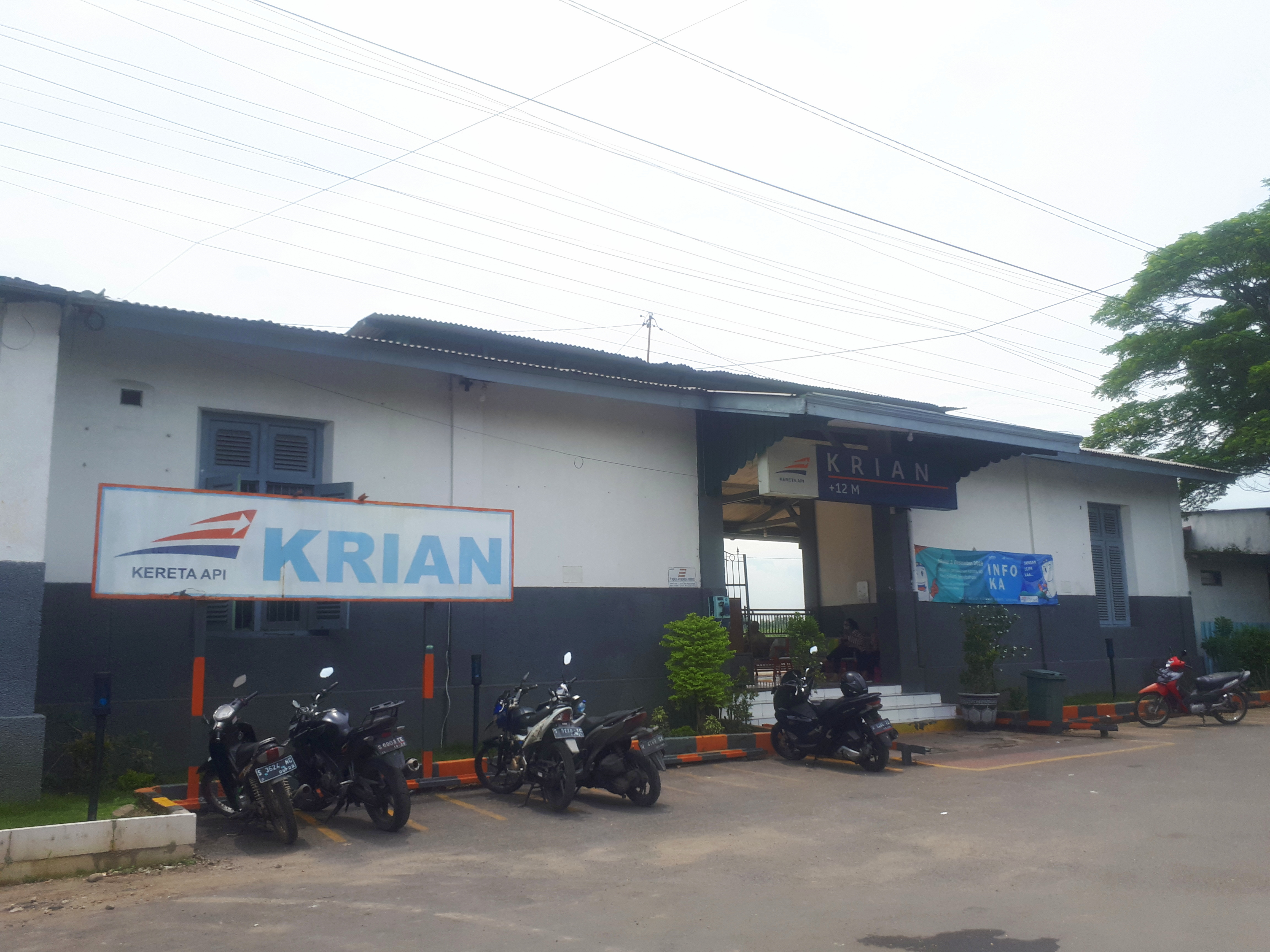 Tampak depan Stasiun Krian, 2020